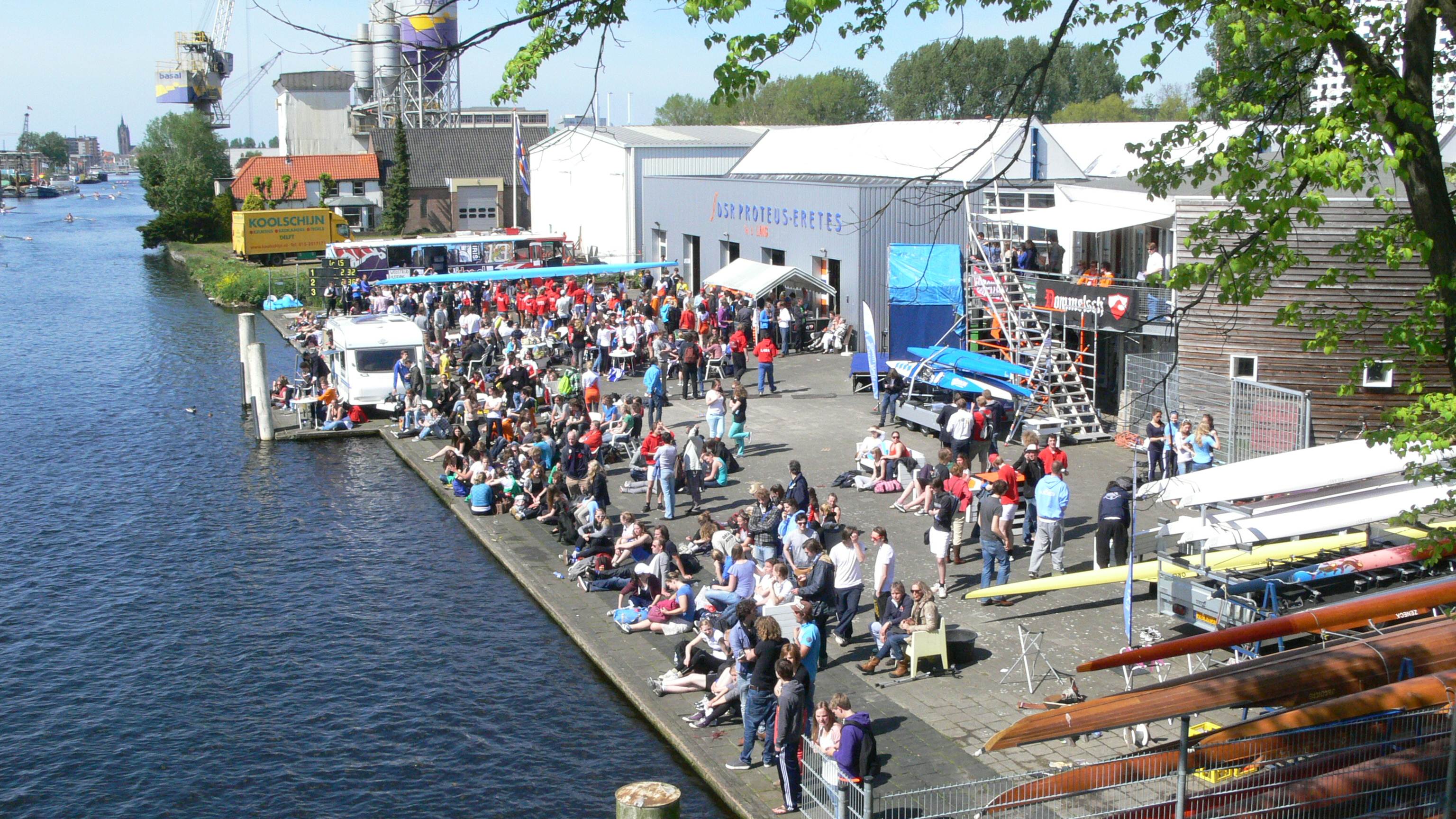 D.S.R. Proteus-Eretes - loods tijdens PEiL 2012